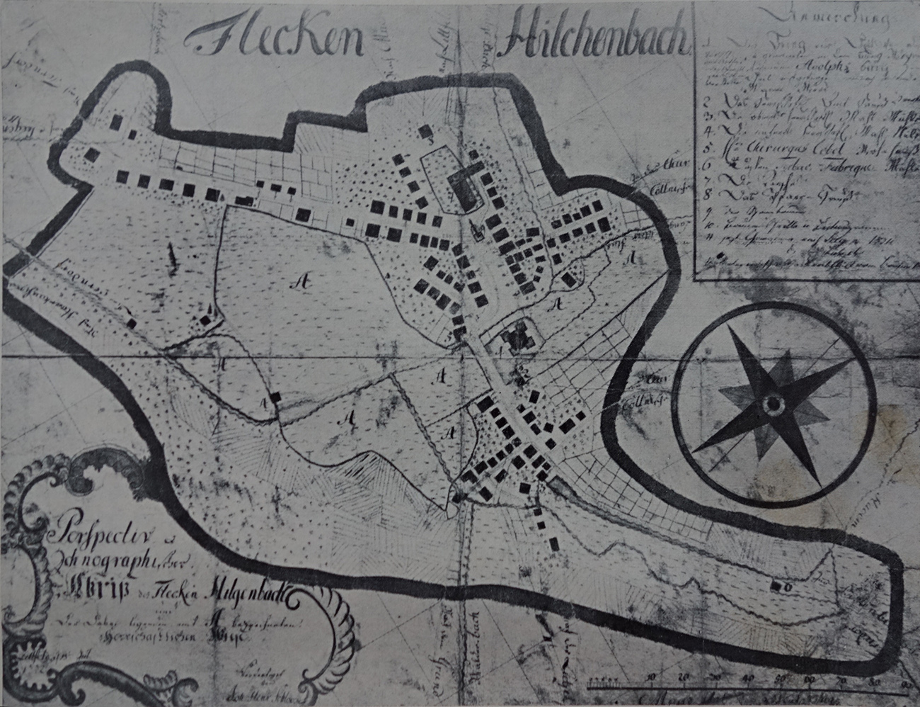 Perspectiv-Ichonographischer Abriß des Flecken Hilgenbach